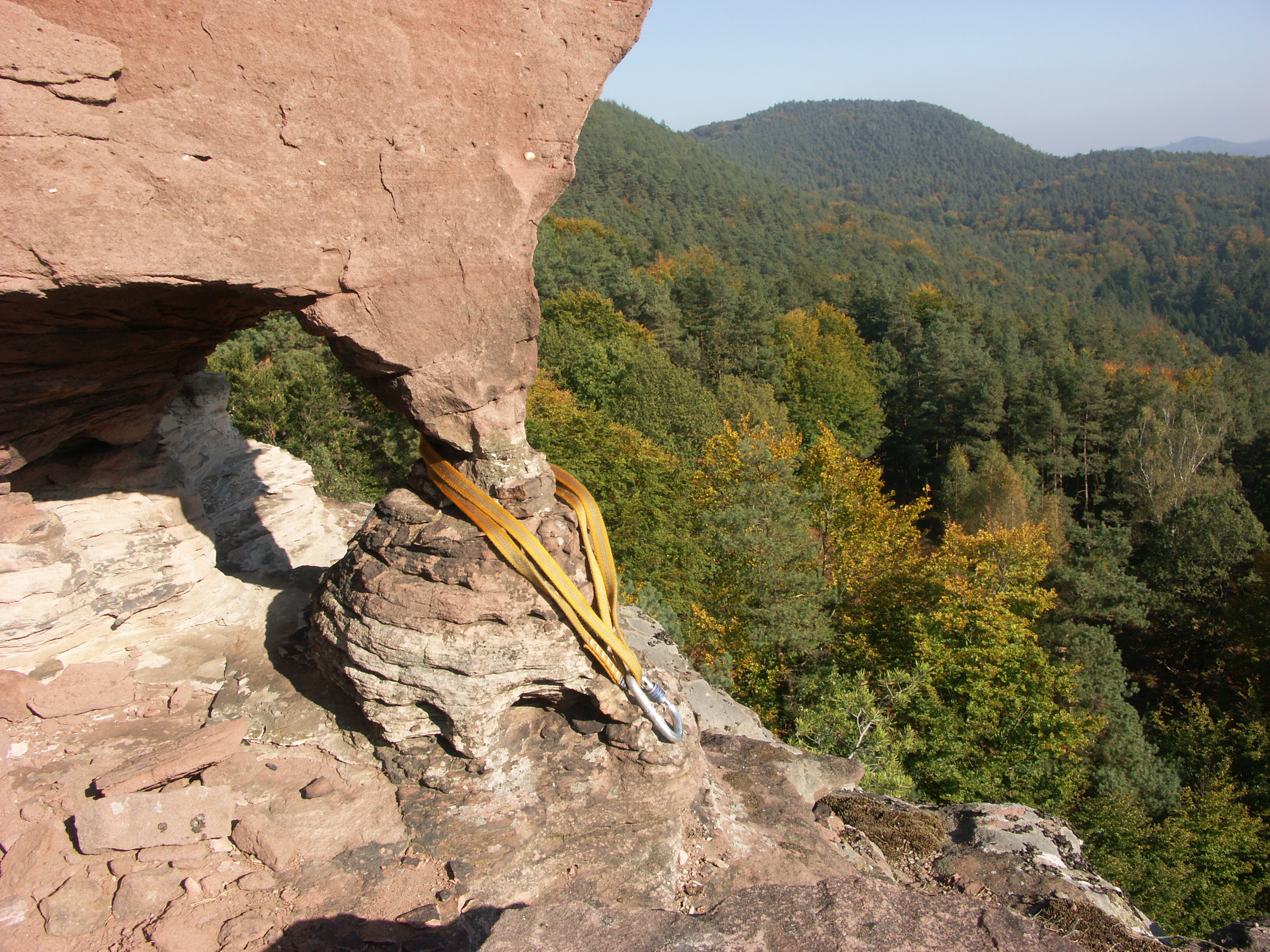 Deutschland, Rheinland-Pfalz, Wasgau, Pferchfeldfelsen bei Dahn, „Sanduhr“